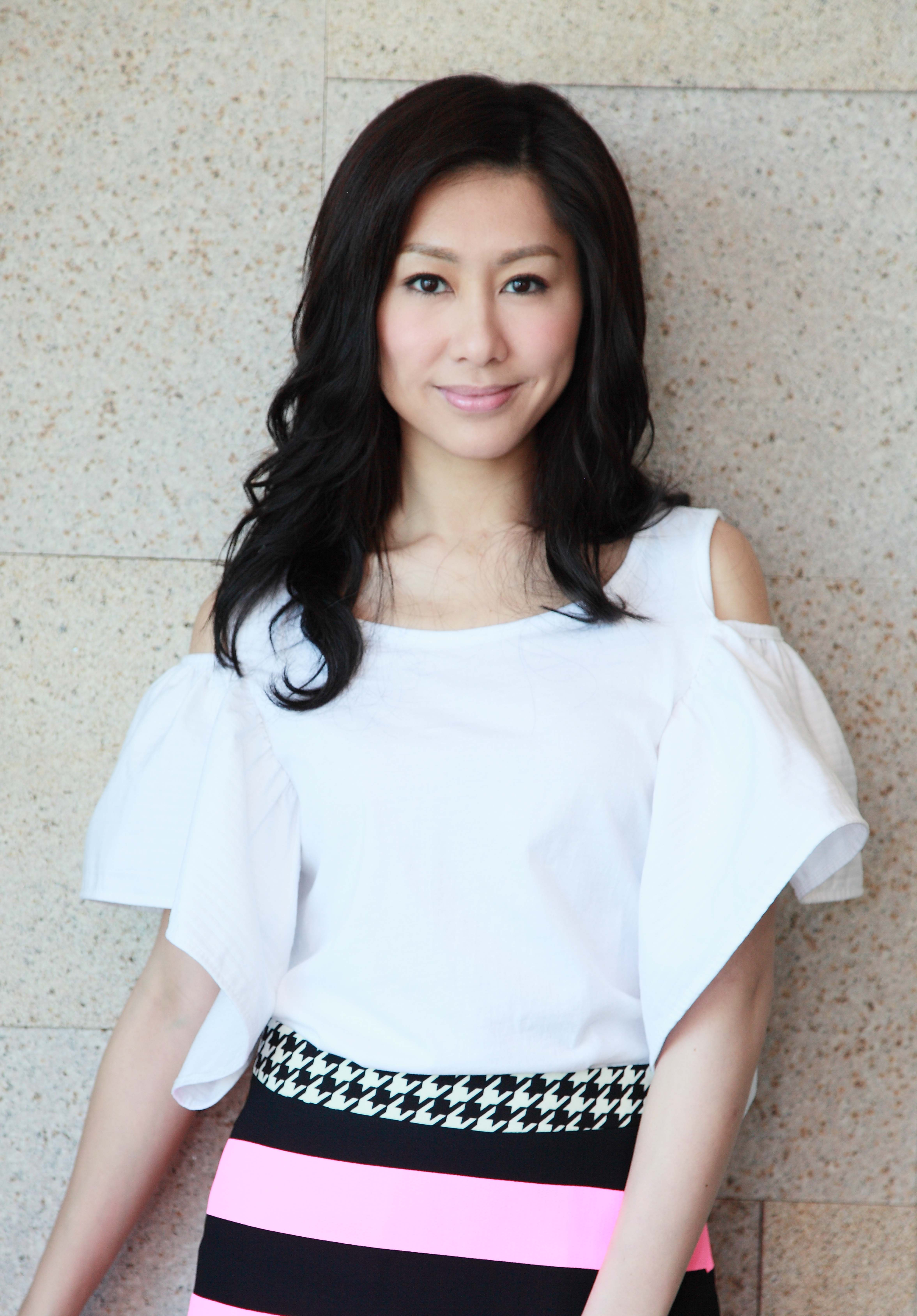 HongKong TVB Artist